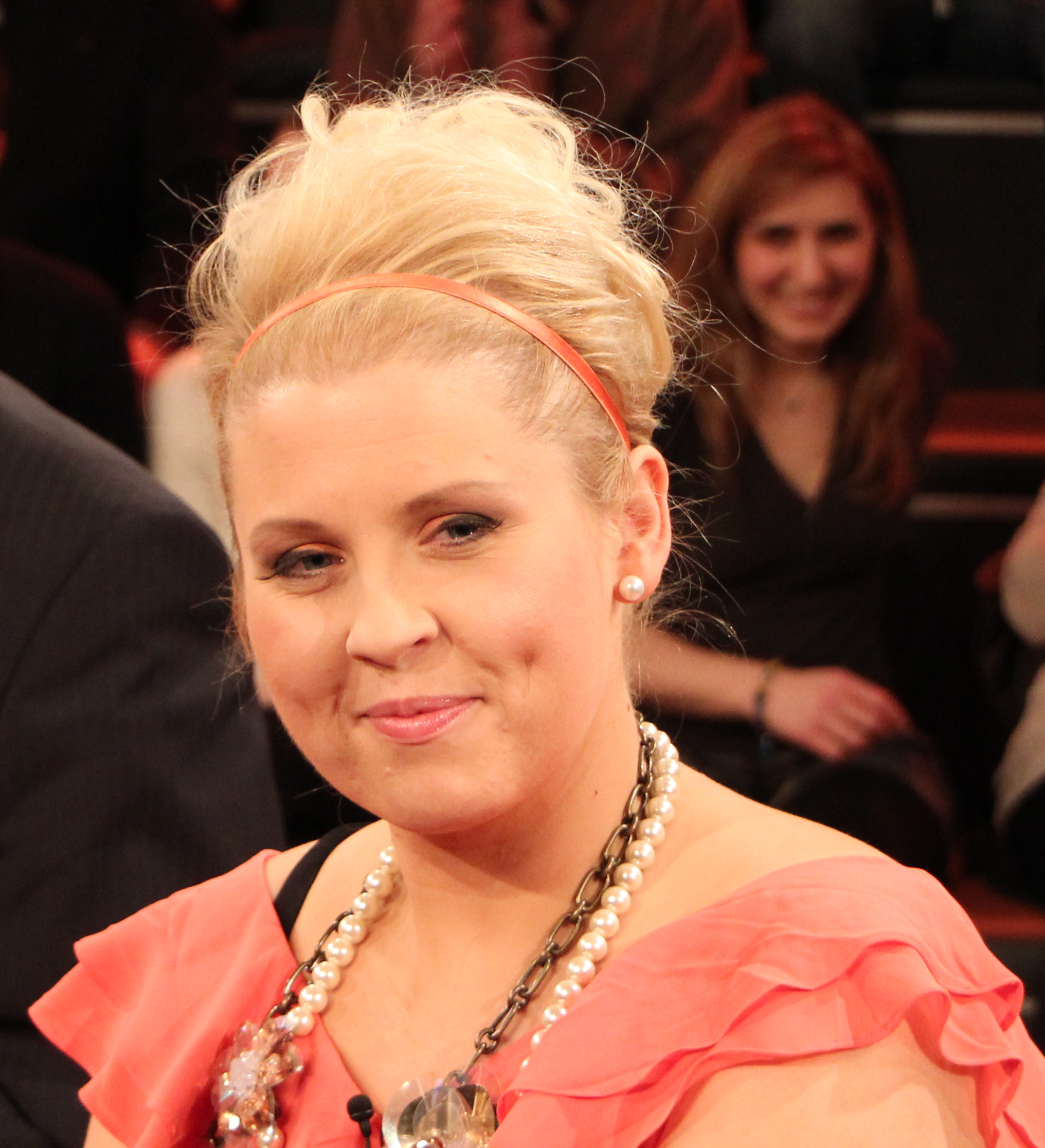 Mitglied der Kelly Familie,Maite Kelly